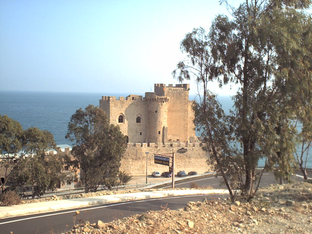 Roseto Capo Spulico (Cosenza): il castello